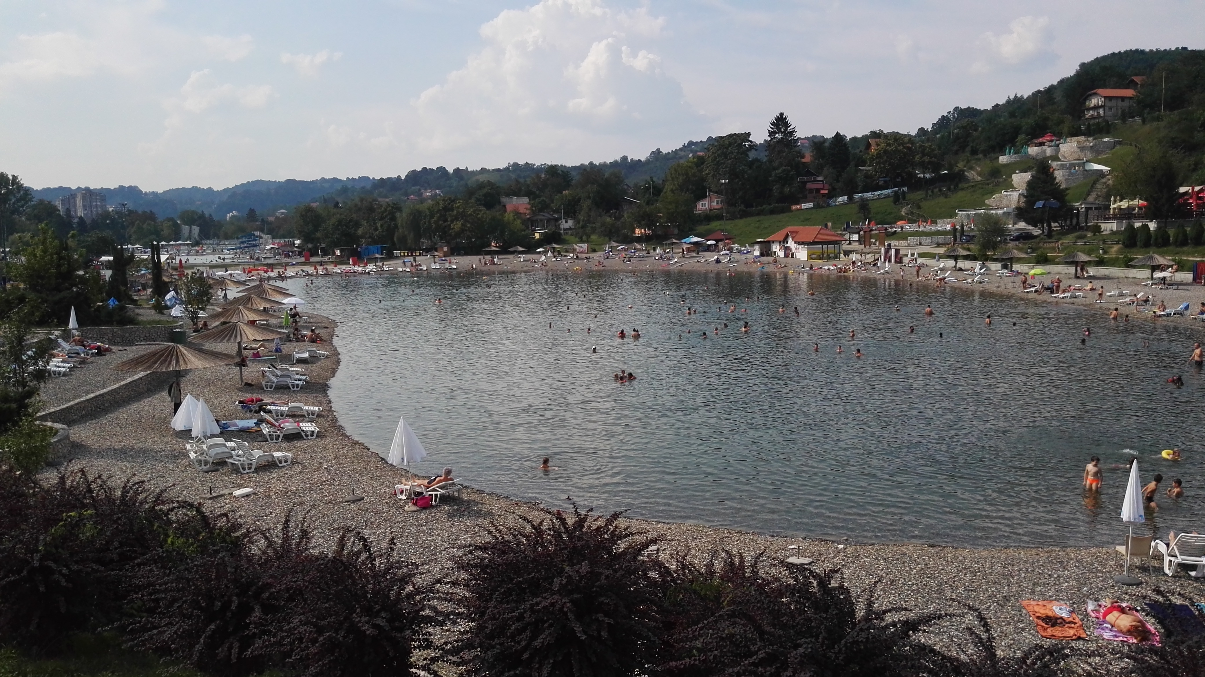 Српски (ћирилица): Tuzla - slana jezera